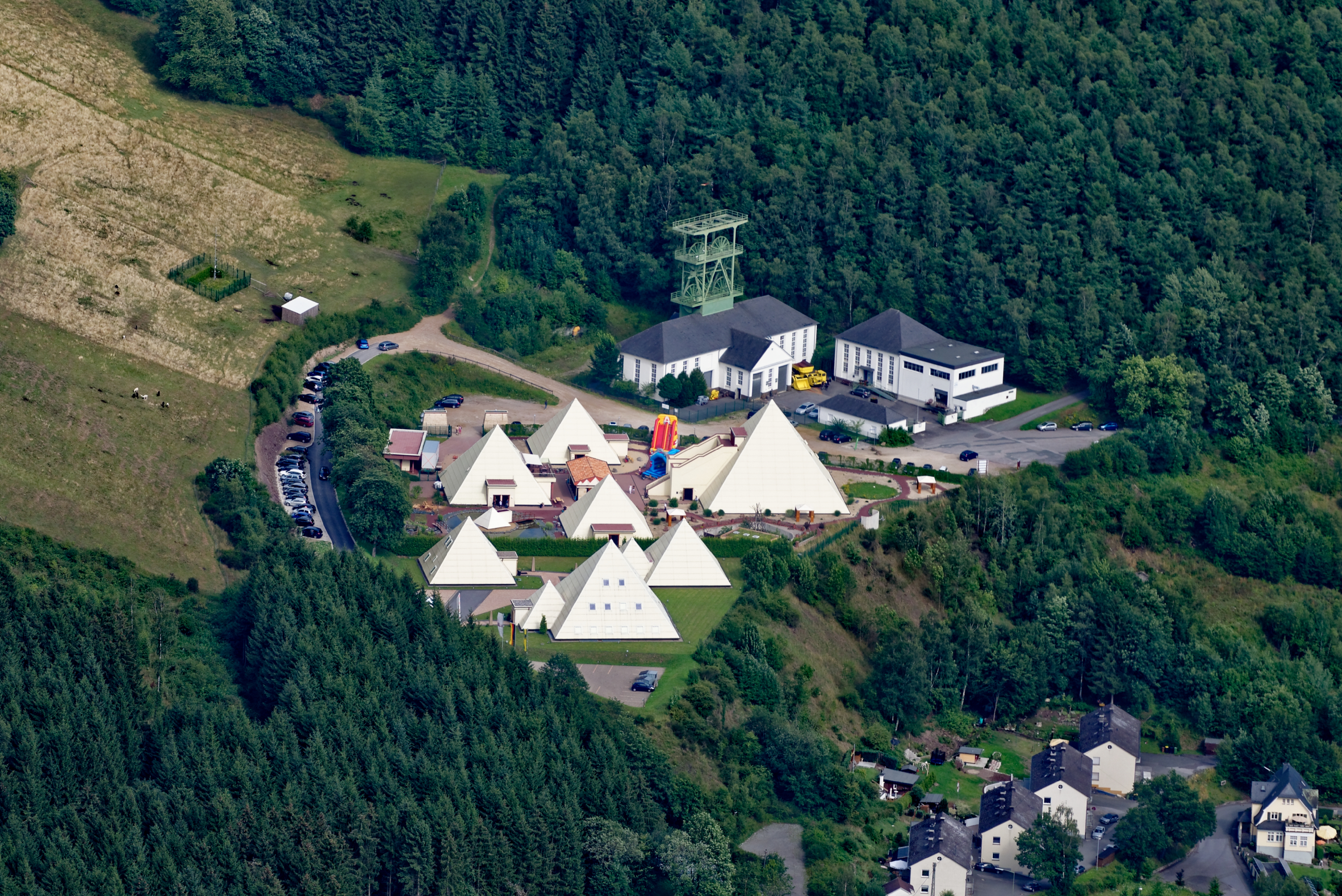 Luftaufnahme: Sauerland-Pyramiden und Bergbaumuseum Siciliaschacht im Galileo-Park in Meggen, Nordrhein-Westfalen